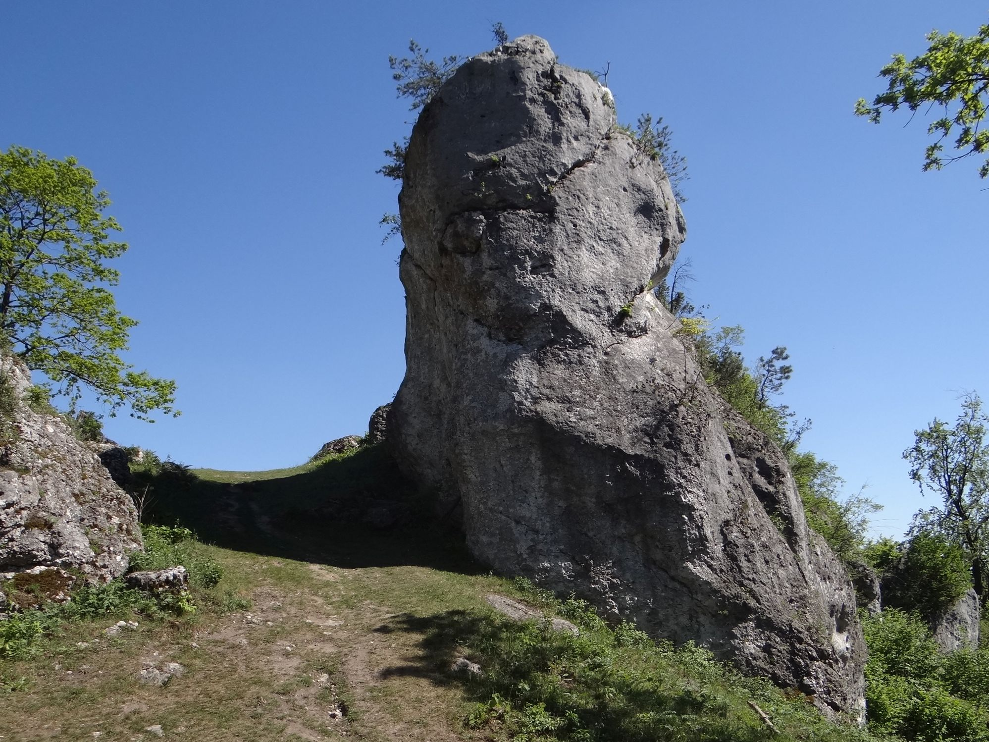 Dolna Baszta w grupie skał na Górze Zborów